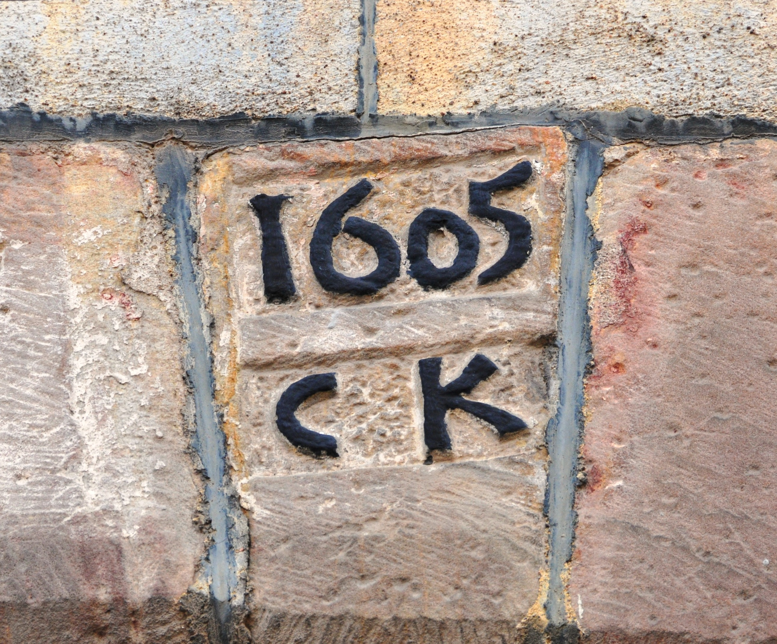 Wandersleben, Jahreszahl in einer Steintafel